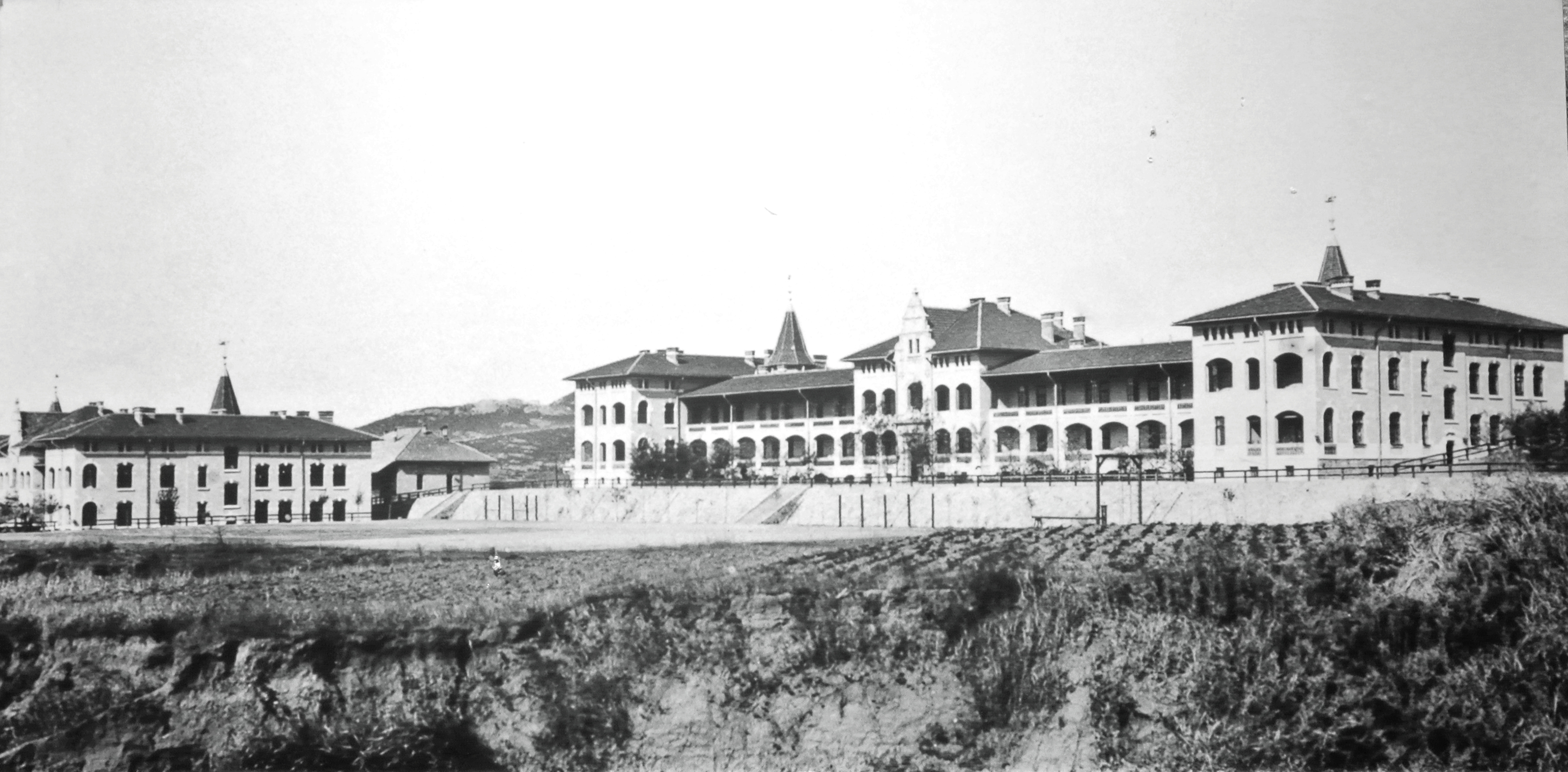 青岛伊尔蒂斯兵营